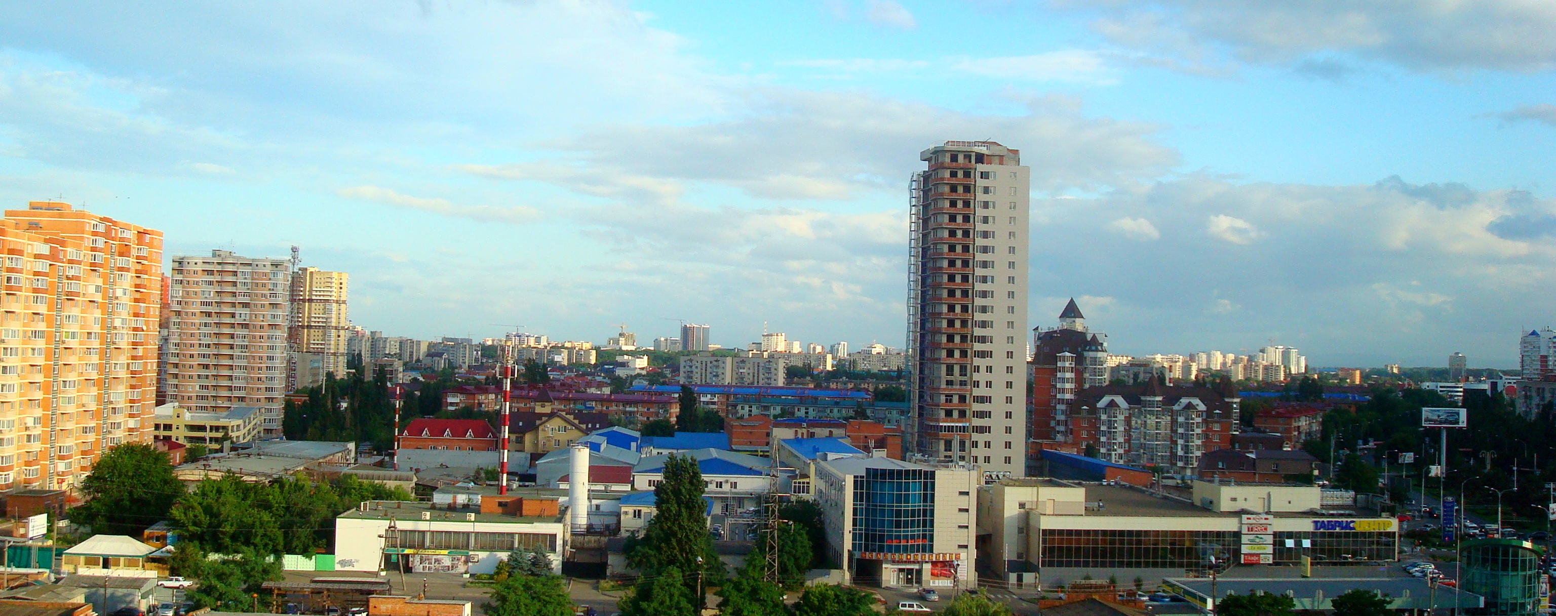 Вид на Краснодар со стороны улицы Тургенева